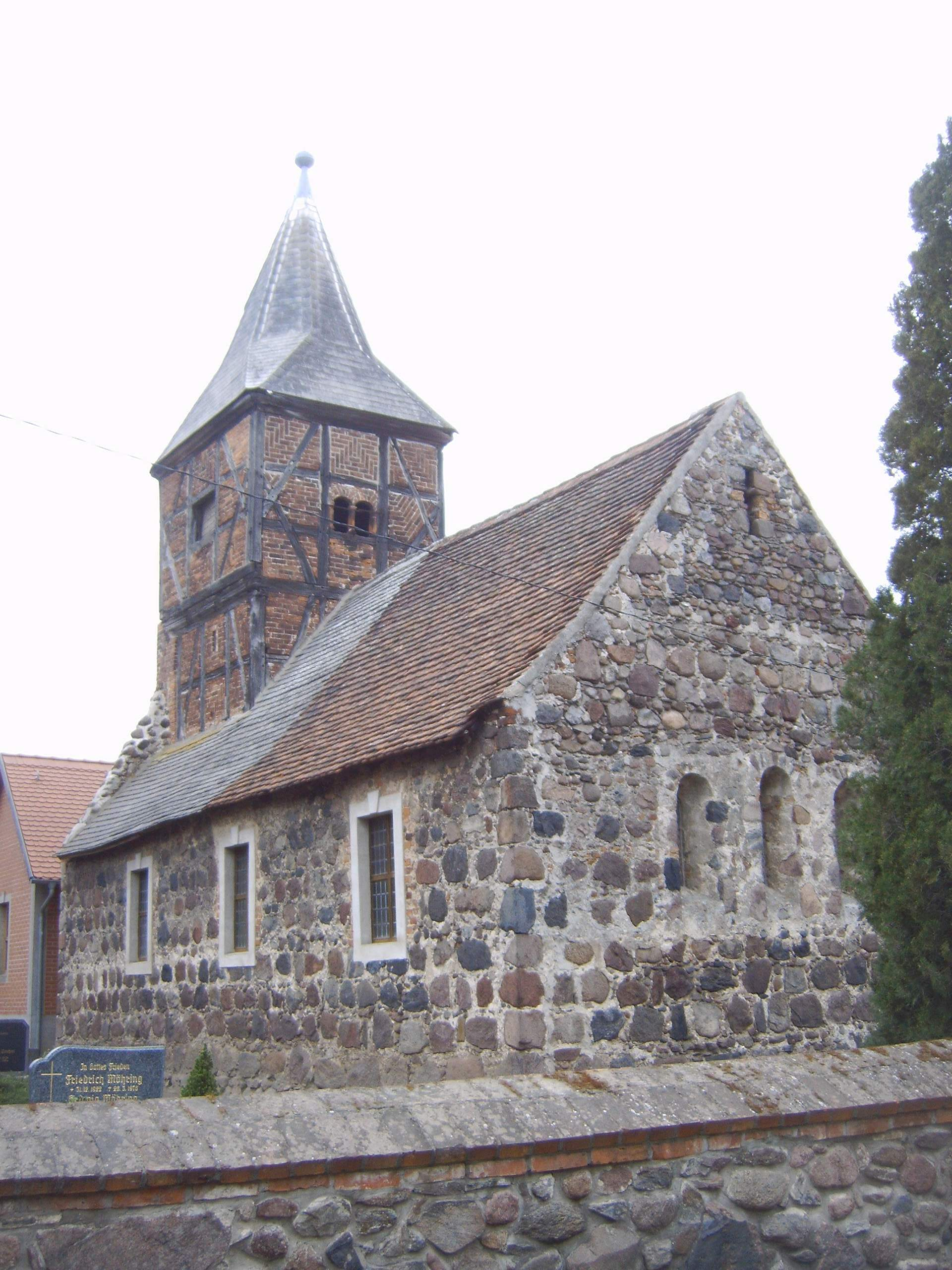 Dorfkirche Dahrenstedt